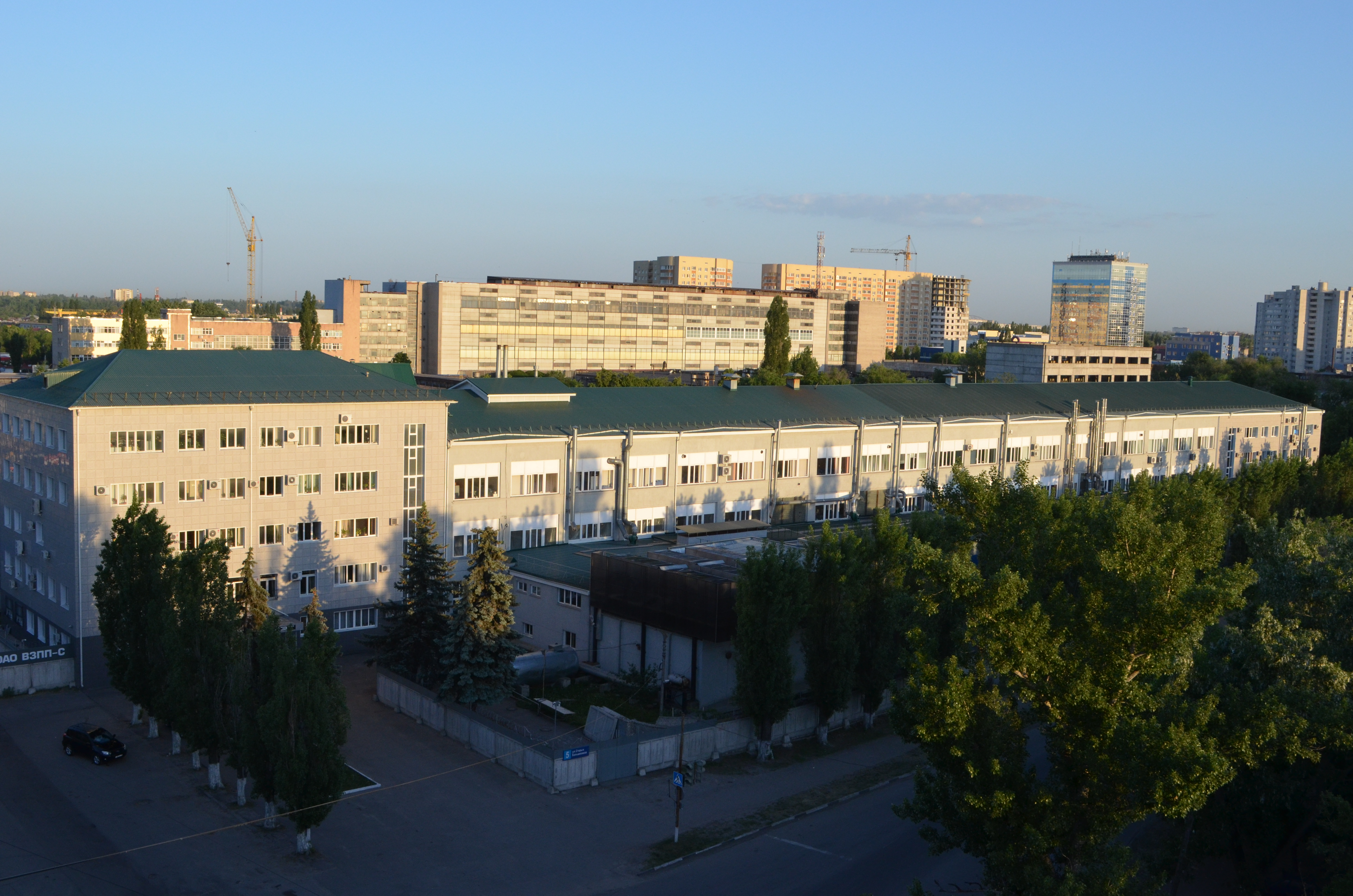 Фото здания НИИЭТ